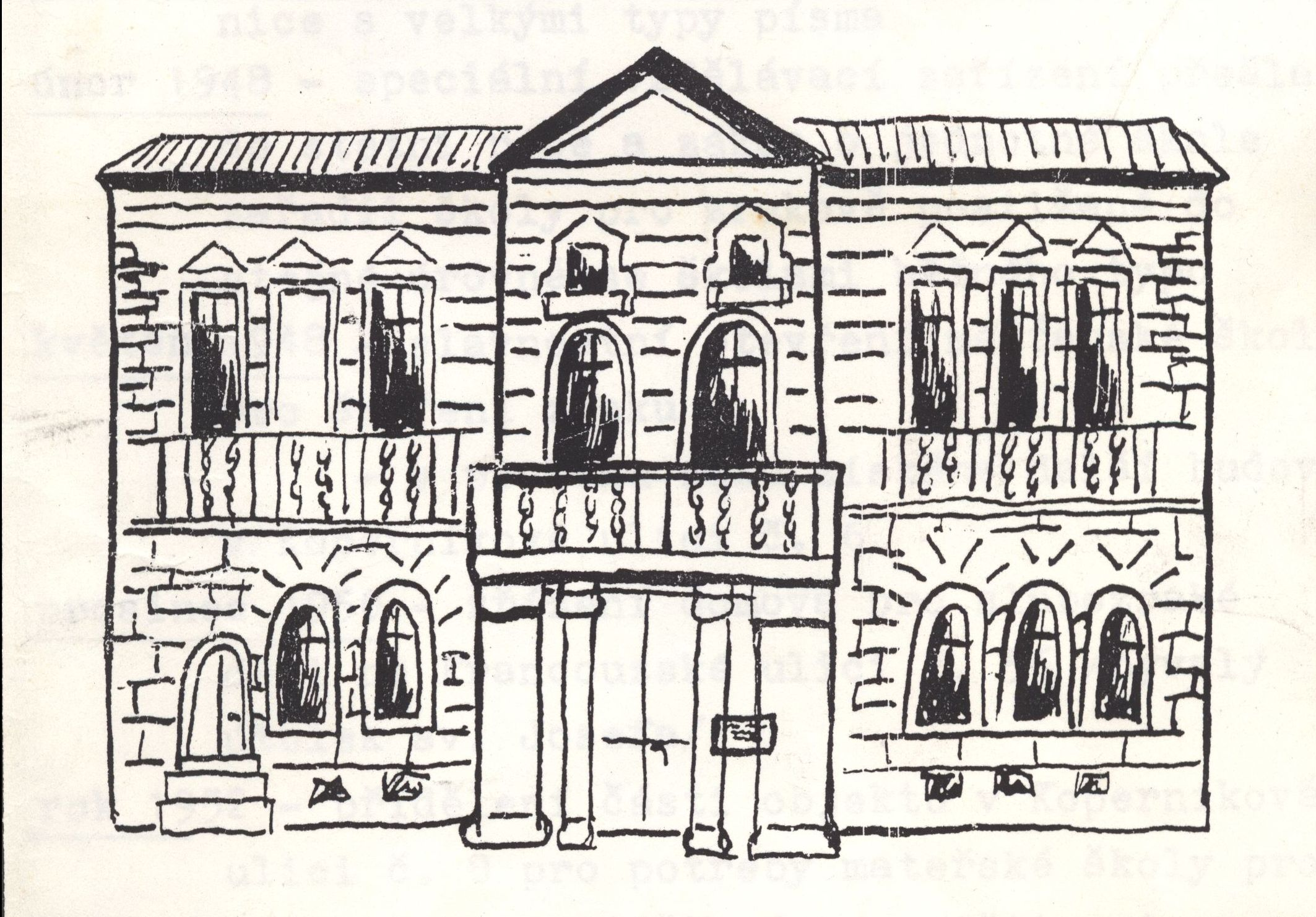 Obrázek zbourané vily Marie, která vévodila Vinohradskému kopci a v které sídlila základní škola pro slabozraké - první stupeň, tj. 1-5. Perokresba budovy z žákovského časopisu k 40. výročí založení školy (1948-1988).